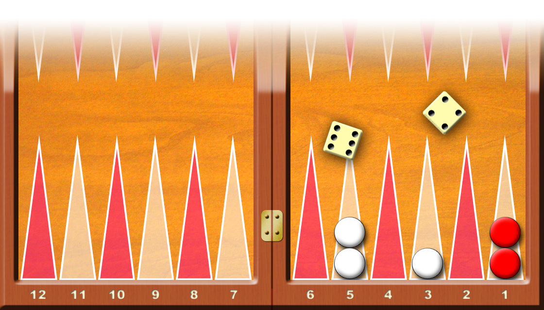 Backgammon--Dadi_6e4-Mossa obbligata nel togliere una sola pedina Francesco De Lorenzo (fr.dl CHIOCCIOLA tiscali.it) è l'autore di questa immagine e l'ha rilasciata sotto licenza GFDL